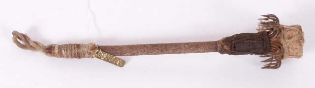 Akkarkrok fra Langfjorden i Gamvik kommune, Finnmark